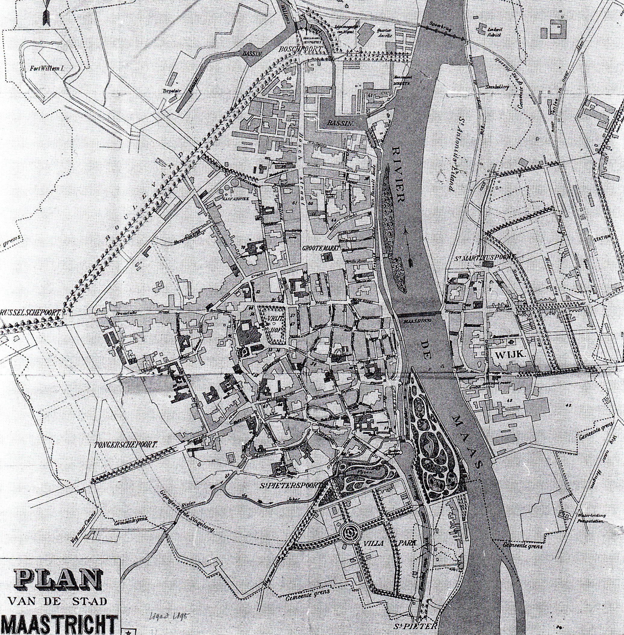 Plattegrond uit ca. 1890-1895: "Plan van de stad Maastricht".